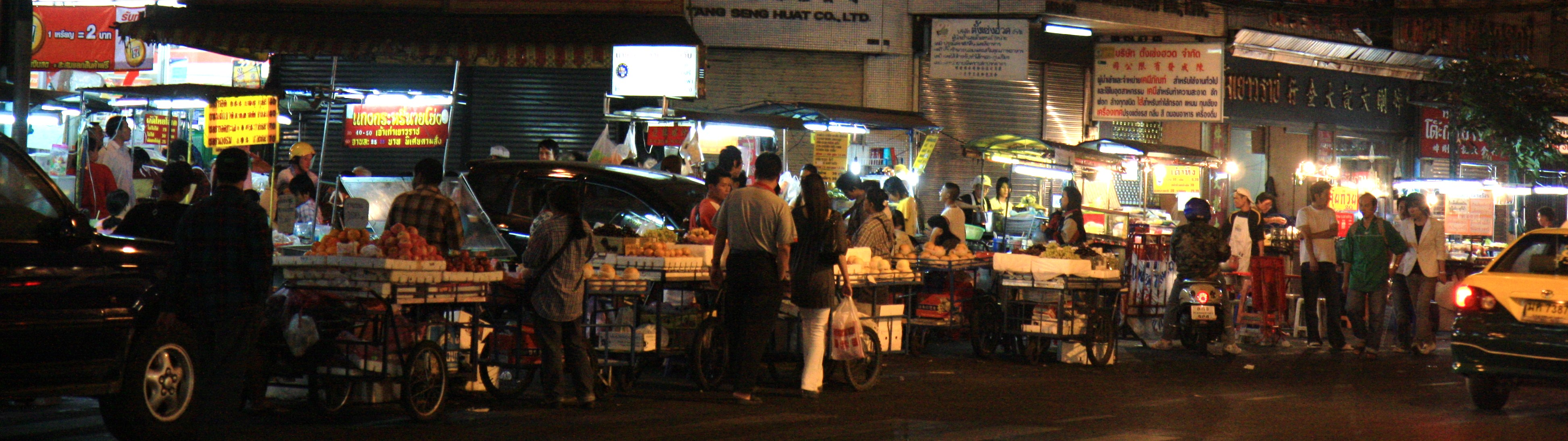 night street stalls in bankok